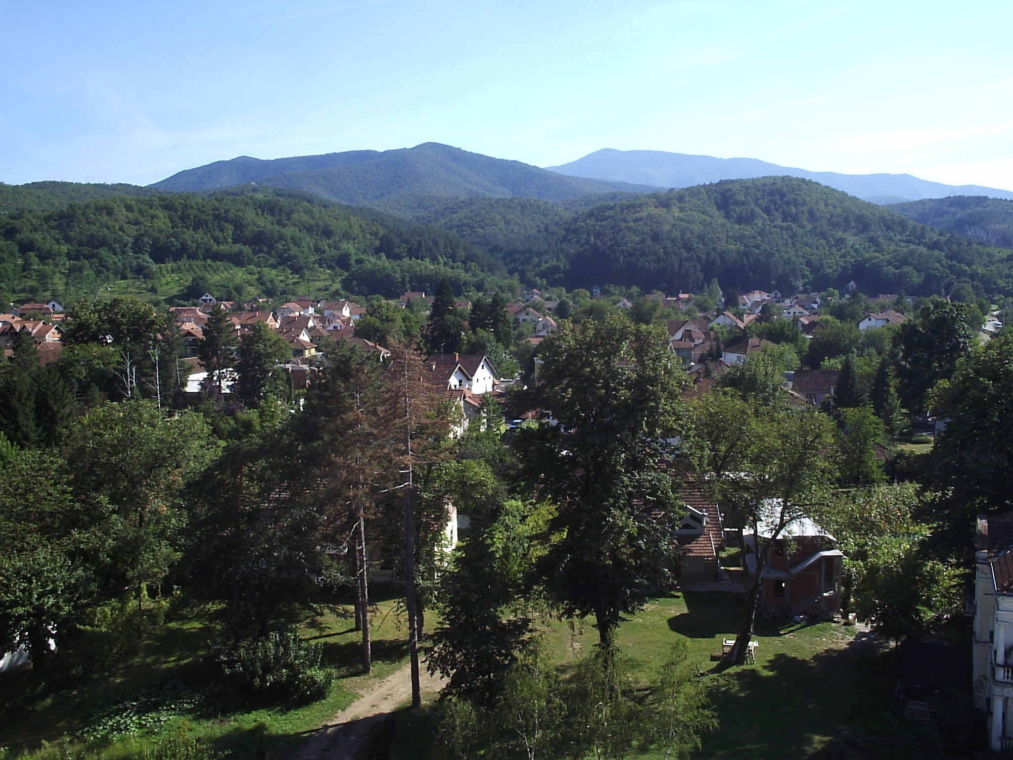 The town of Mataruška Banja, Serbia/La ville de Mataruška Banja, Serbie